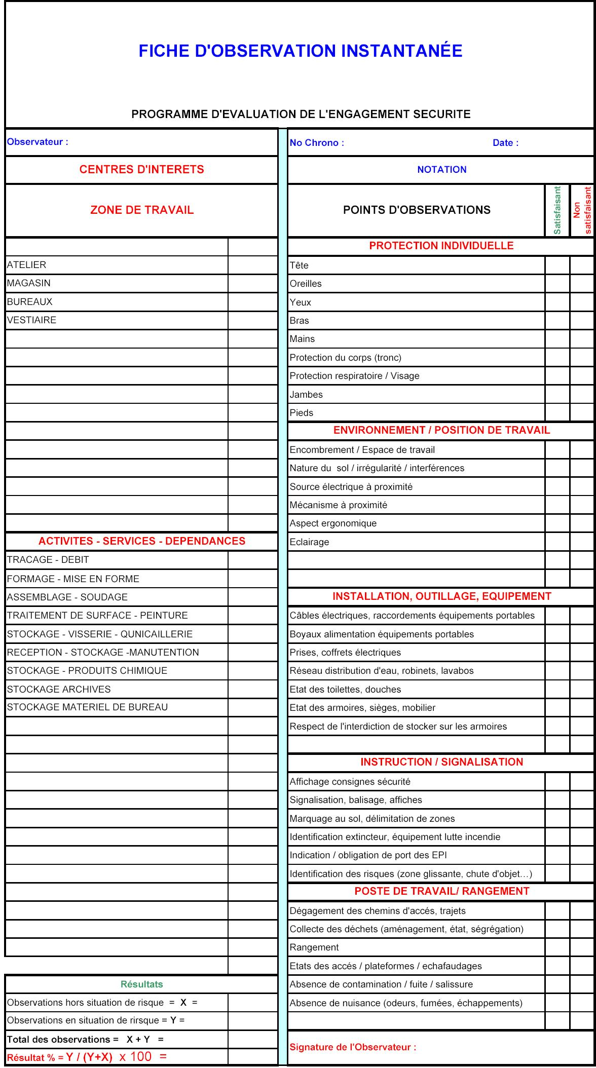 Support pour observation instantanée - Managemengement de la sécurité du travail